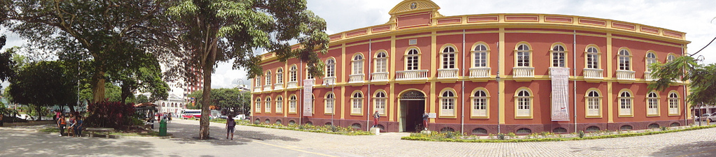 Palacete Pronvincial em Manaus